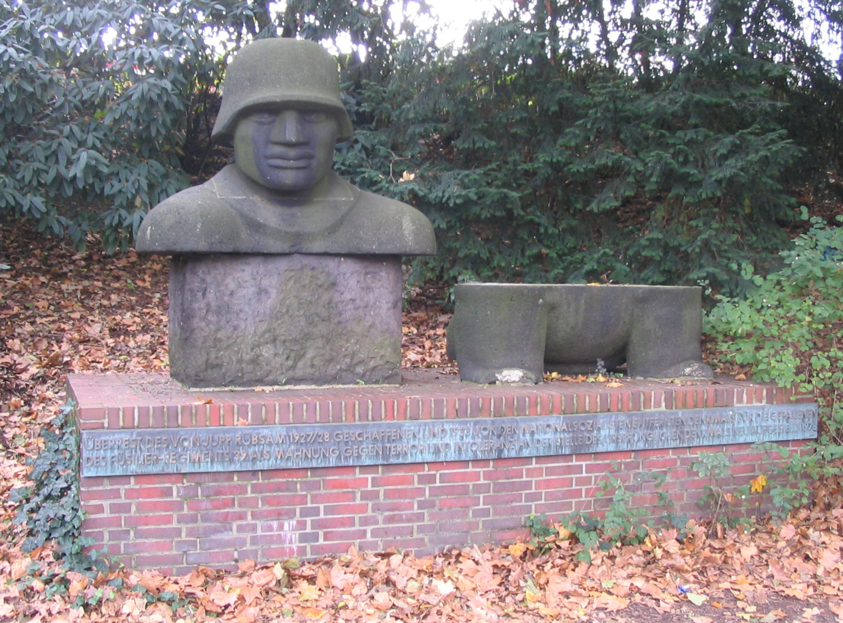 Erhaltene Fragmente des (ersten) Gefallenen-Ehrenmals des Niederrheinischen Füsilier-Regiments Nr. 39 in Düsseldorf-Pempelfort, vor der heutigen Tonhalle; 1928 von Bildhauer Jupp Rübsam. Auf der Grünfläche östlich der Tonhalle stehen die erhaltenen Überreste von Rübsams 39er-Denkmal für die Gefallenen des Niederrheinischen Füsilier-Regiments Nr 39 „General Ludendorff“. Der Entwurf mit dem Motto „Innere Festigung“ wurde von einem Ausschuss der Regimentsangehörigen in einem Wettbewerb preisgekrönt. Dennoch war der Entwurf mit zwei liegenden, den Feind erwartenden Soldaten von Anfang an umstritten, er erzeugte trotz seiner Monumentalität nicht das Pathos, das damals für derartige Ehrenmale üblich war. Die Auseinandersetzung ging soweit, dass General Ludendorff als treibende Kraft der gegen das Denkmal gerichteten Kampagne forderte, seinen Namen davon entfernen zu lassen. Das nationalsozialistische Propaganda-Blatt Völkischer Beobachter bezeichnete die Darstellung als „zwei menschliche Ungetüme auf dem Bauch, wie Sphinxe, plump, roh, tierisch mit Händen, die überlebensgroße Flossen oder Pfoten sind.“ Bereits im März 1933, wenige Wochen nach der Machtübernahme, entfernten die Nationalsozialisten das für sie unerwünschte Denkmal. Fünf Jahre später wurde ein vom Hamburger Bildhauer Richard Kuöhl gestaltetes neues Ehrenmal für die 39er am Reeser Platz in Düsseldorf-Golzheim errichtet. Die Reste des im Zweiten Weltkrieg stark beschädigten Denkmals von Rübsam, der selbst Regimentsangehöriger war, wurden nach Fertigstellung der Tonhalle auf einem gemauerten Sockel in der Nähe des ursprünglichen Platzes aufgestellt.